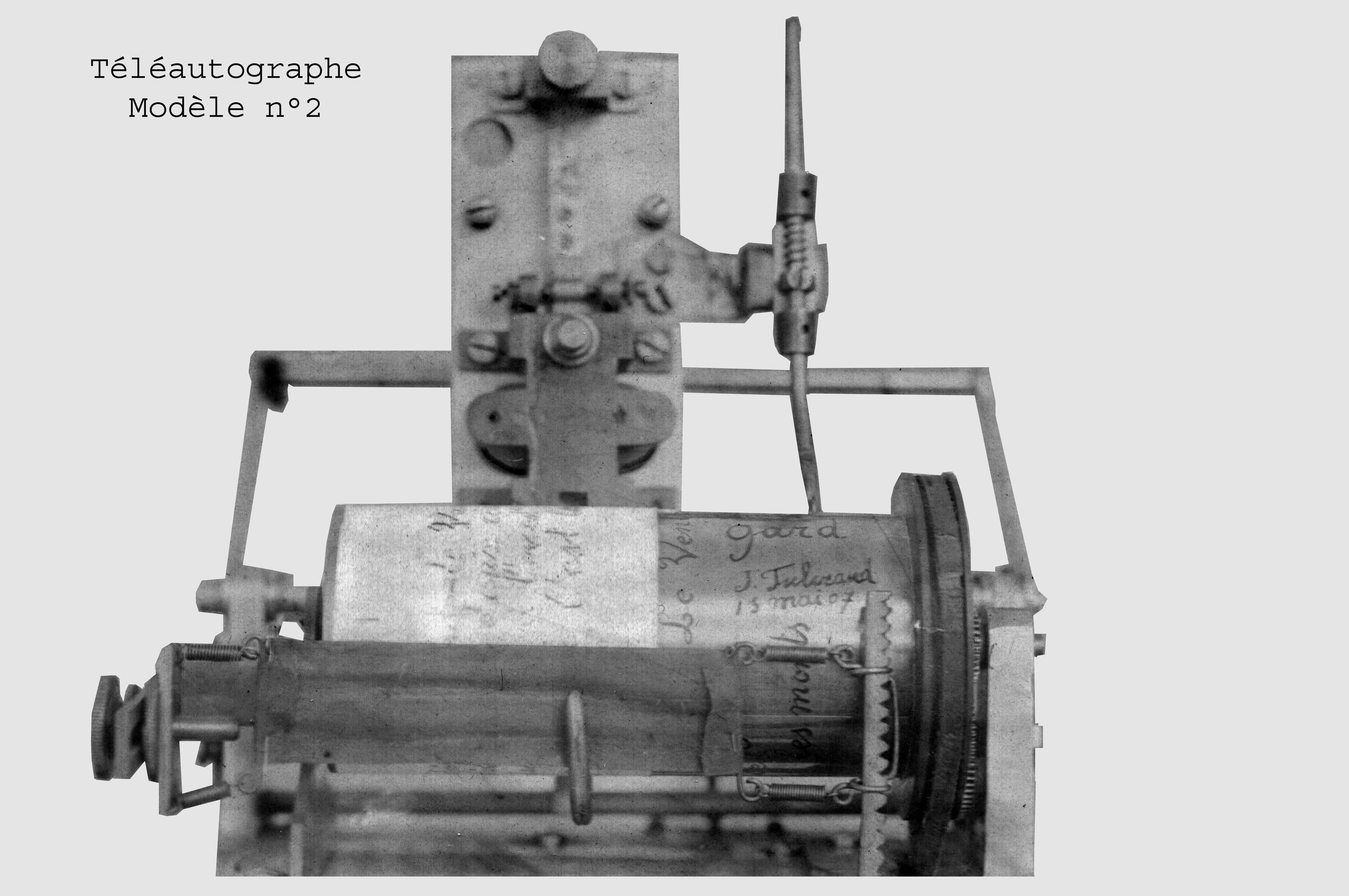 Téléautographe 2ème modèle